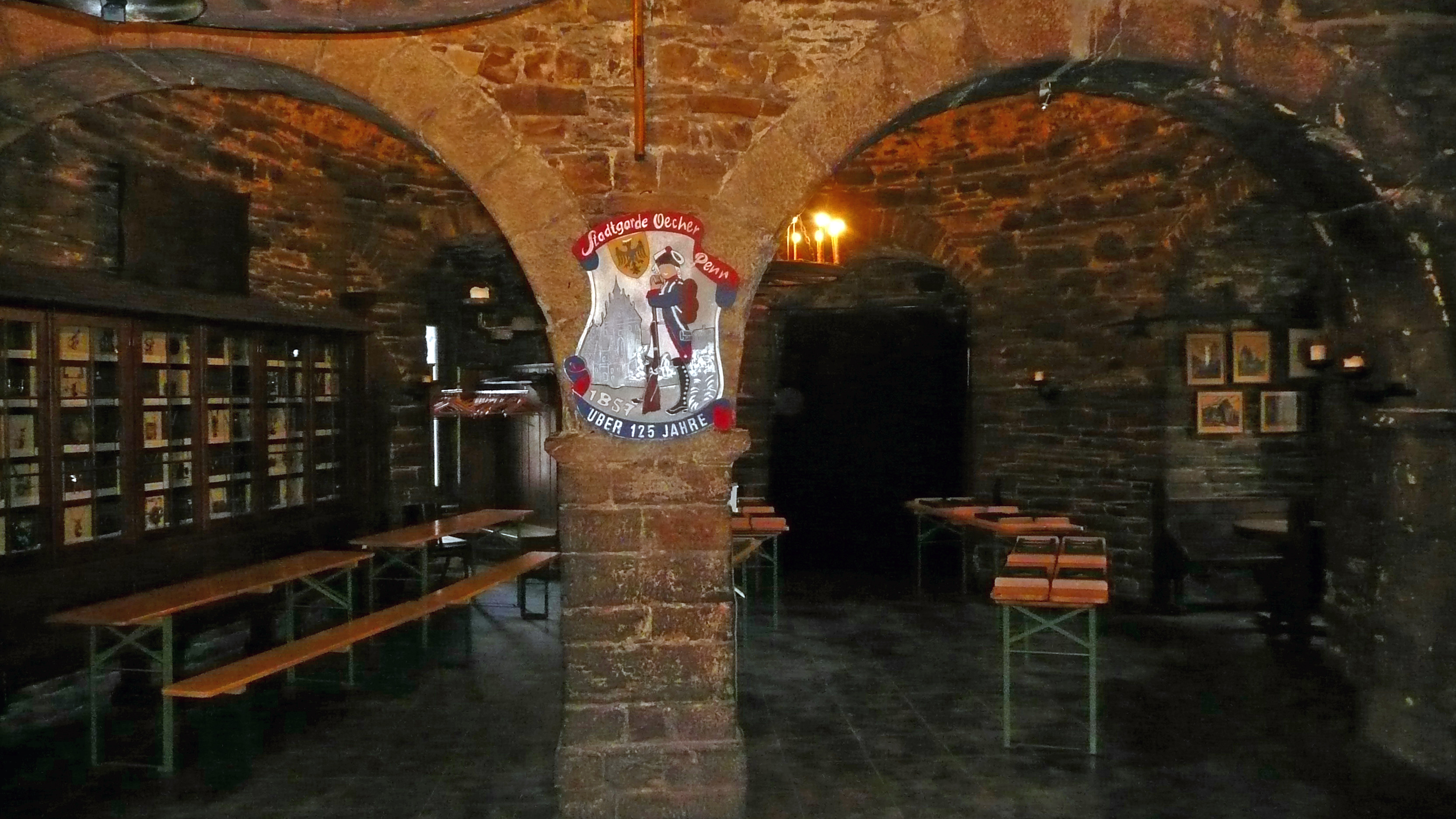 Marschiertor in Aachen, großer Saal